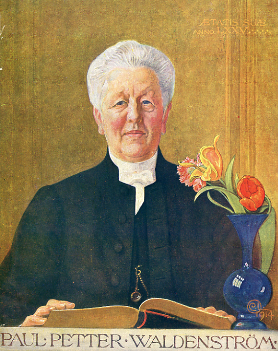 portrait of Paul Petter Waldenström